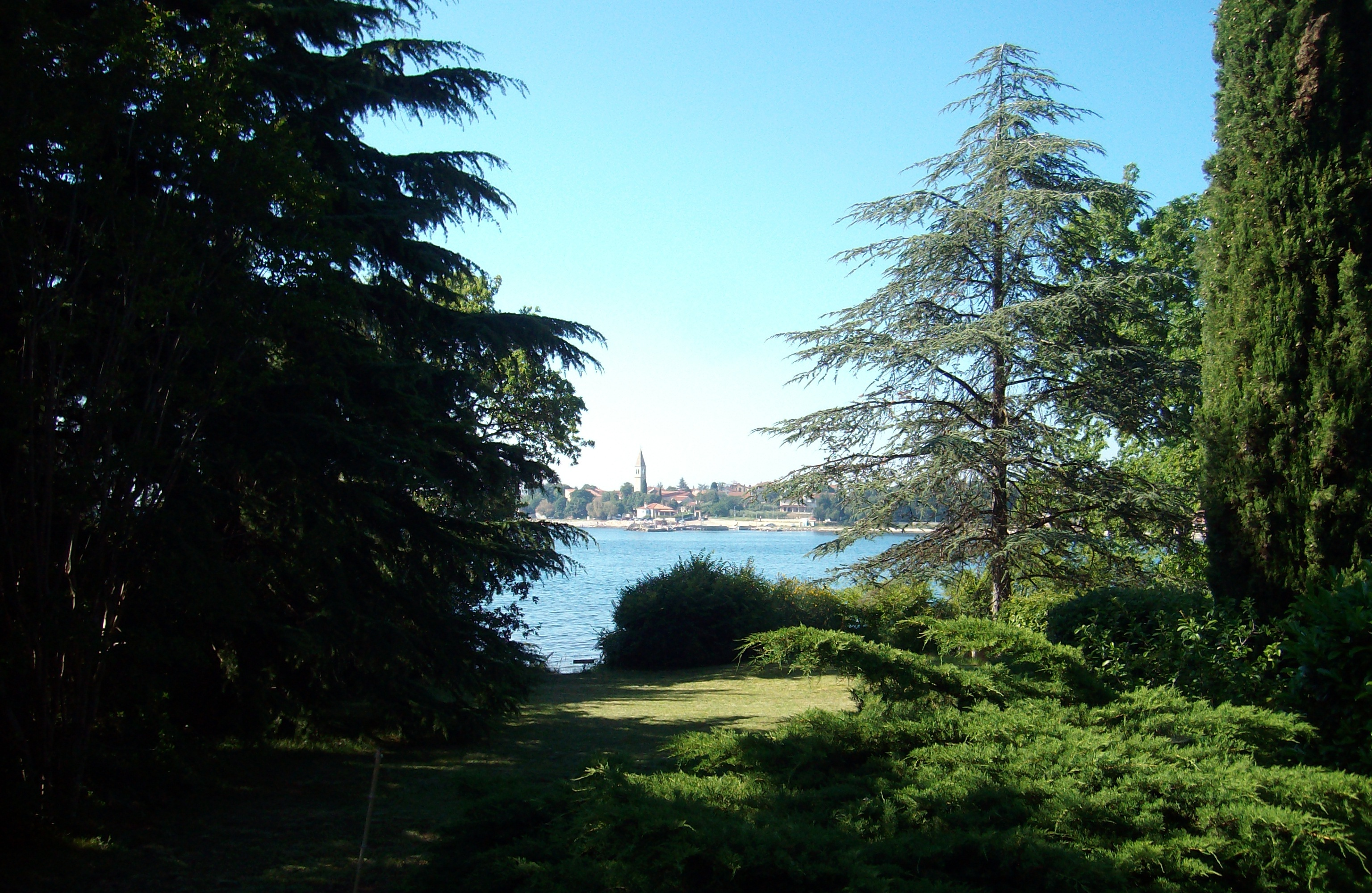 Lovrečica slikana iz druge strani polotoka Srpskohrvatski / српскохрватски: Lovrečica sa druge strane polotoka.